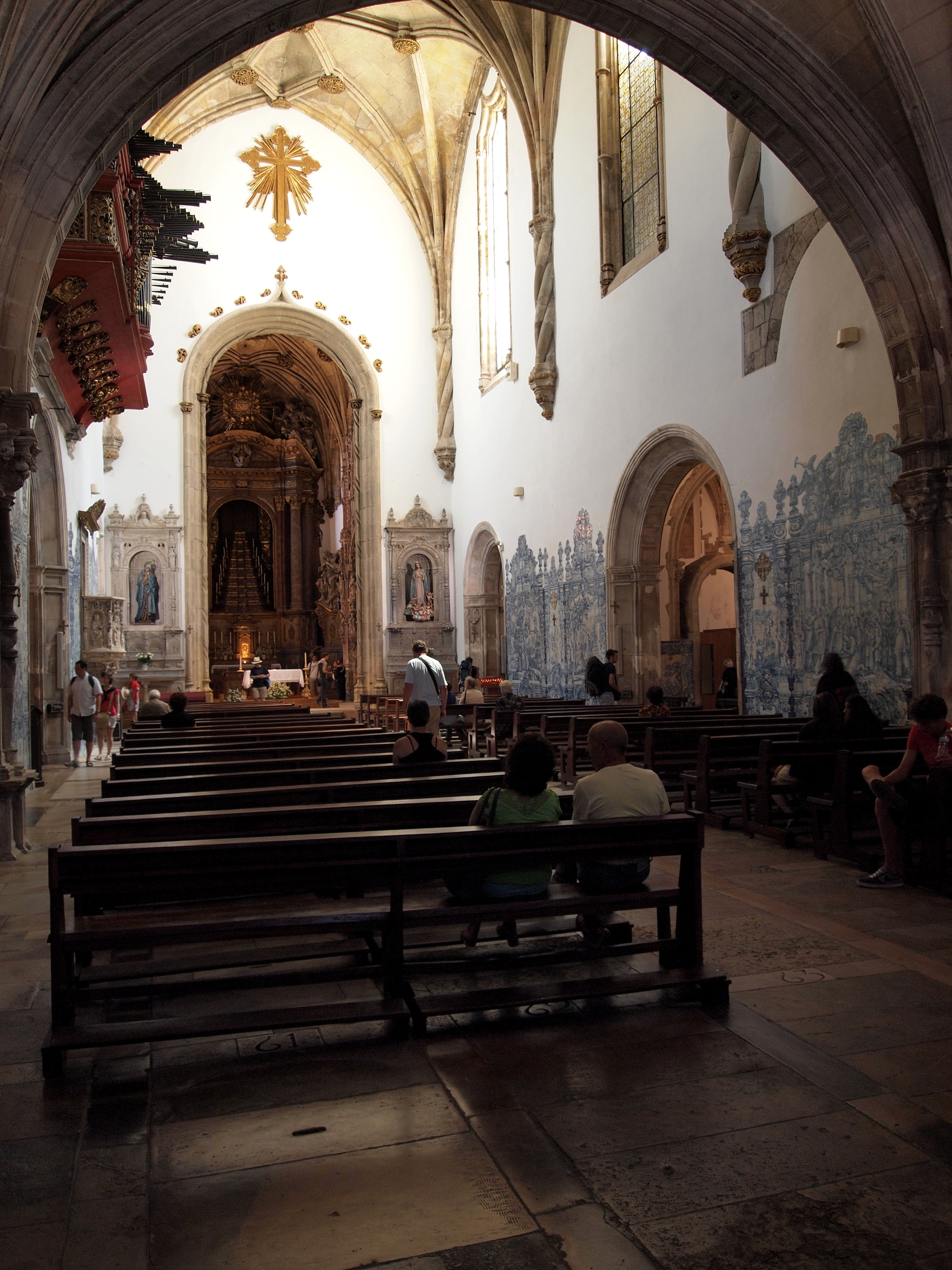 Coimbra